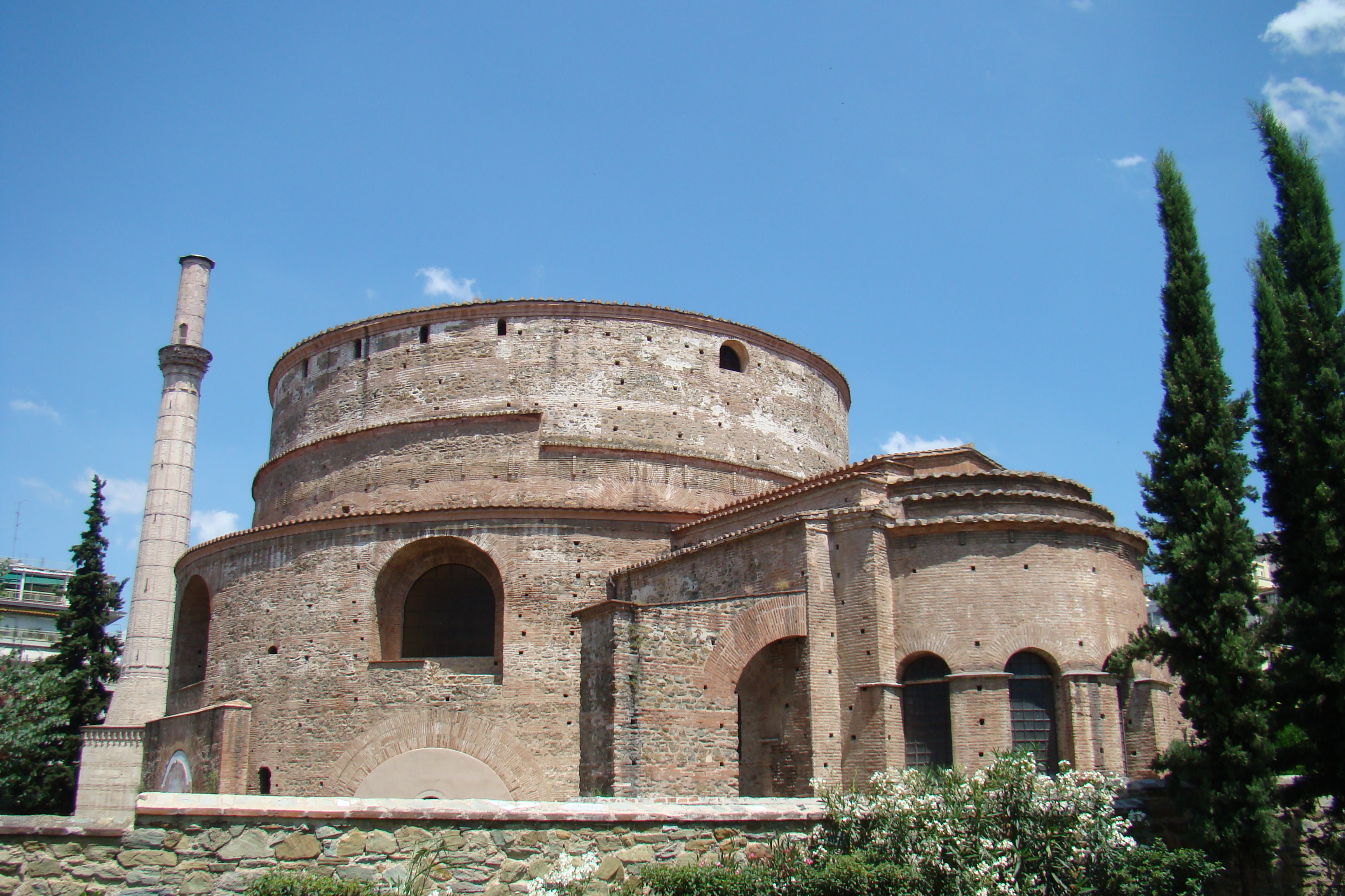 Grèce: Eglise Saint Georges à Salonique.